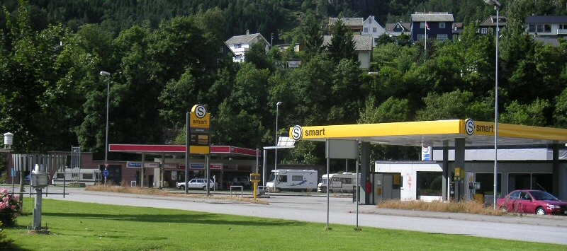 Bilete teken frå Vangsnes mot krossen Kyrkjegata Saudasjøvegen.